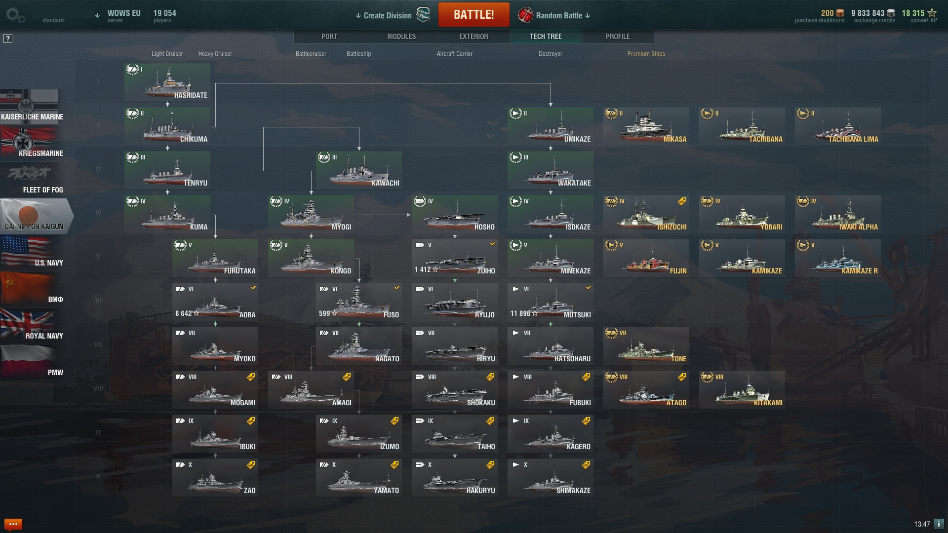 Lista de naciones y barcos disponibles.